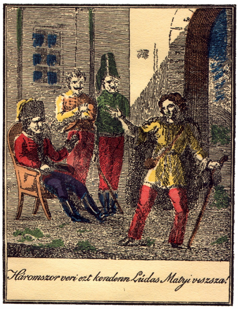 A Lúdas Matyi 1817-es bécsi kiadásából Göbwart F. S. egykorú, színes illusztrációja: Háromszor veri ezt kenden Lúdas Matyi vissza!